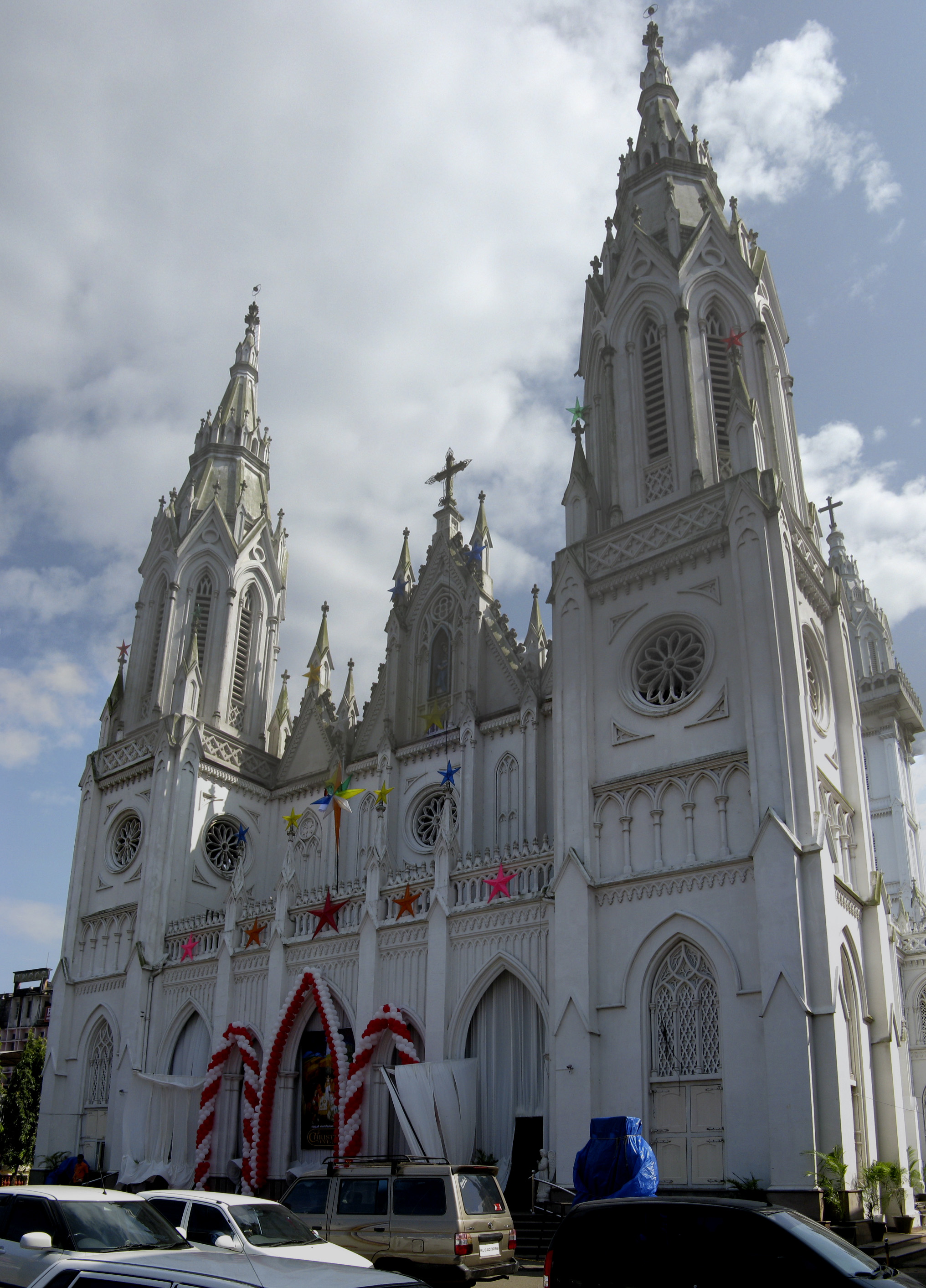 Basílica de Nuestra Señora de los Dolores (Puthan Pally). Thrissur, Kerala, India.